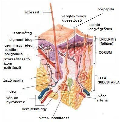 A bőr felépítése